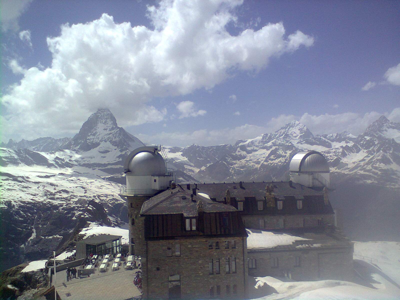 zermatt